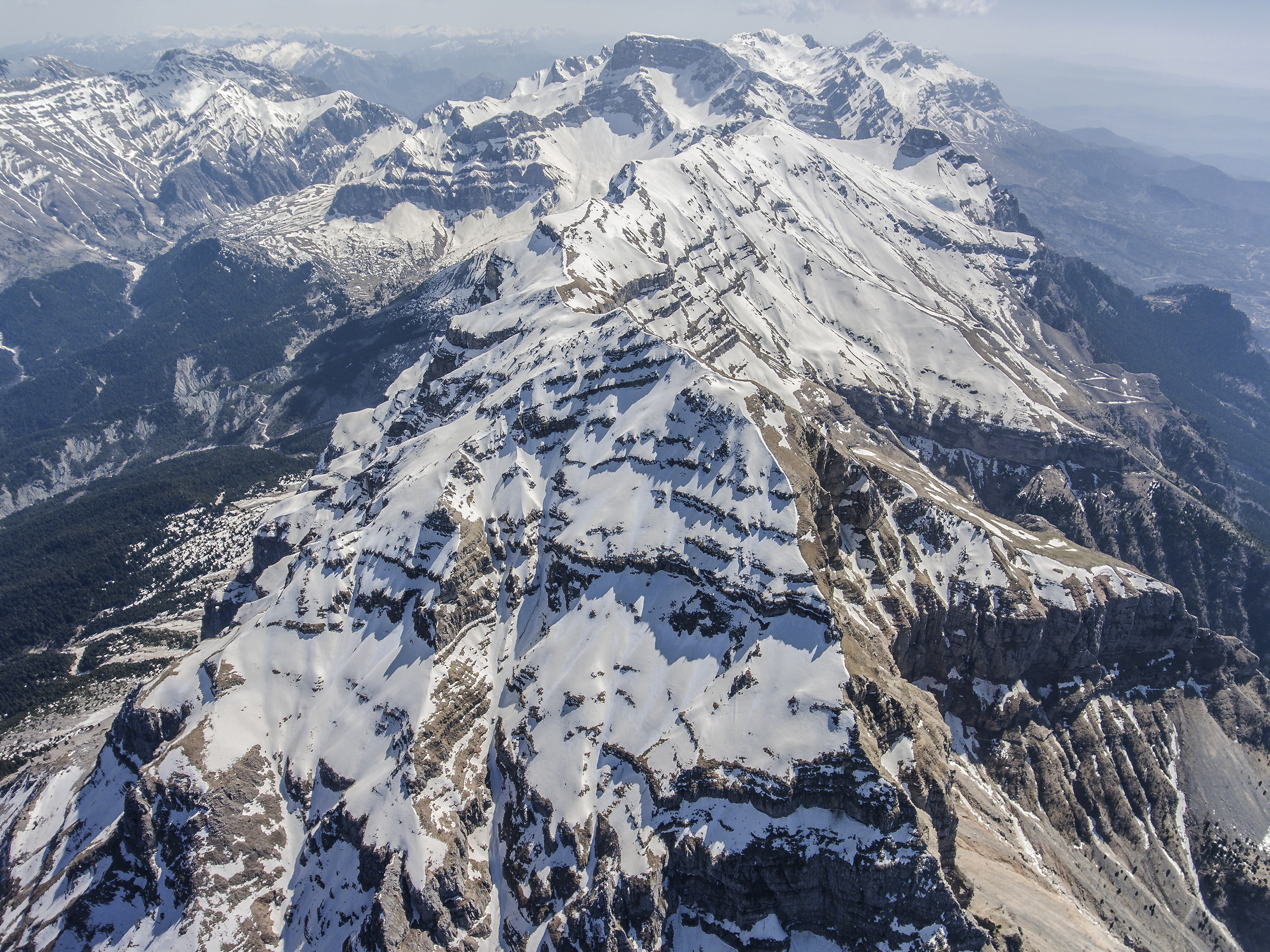 Τα Τζουμέρκα όπως φαίνονται από την πλευρά της Στρογγούλας This is a photography of Natura 2000 protected area with ID GR2110002